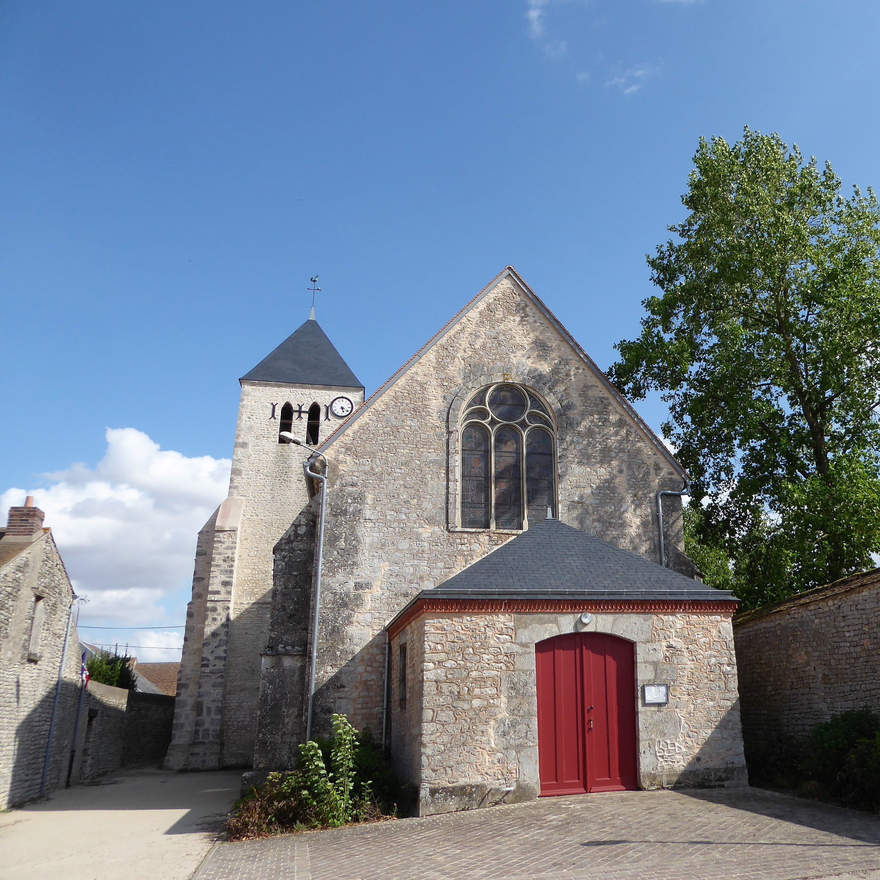 église Saint-Benoît de Mérouville, Eure-et-Loir, France.